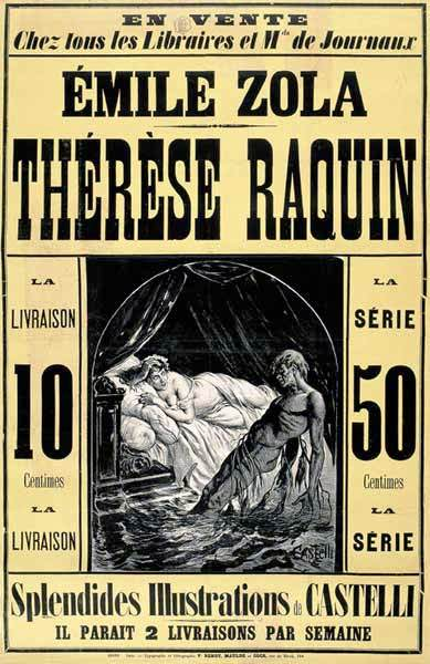 Publicité pour Thérèse Raquin - ca 1867